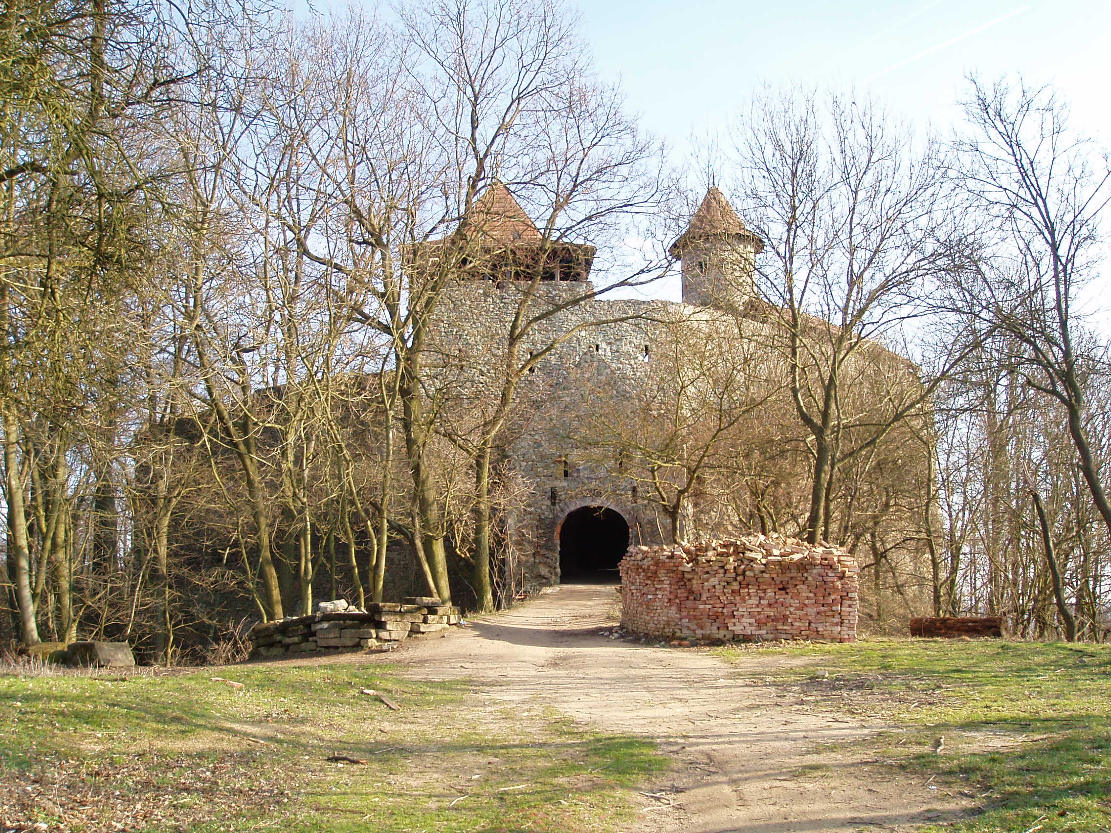 Nový hrad u Olomučan